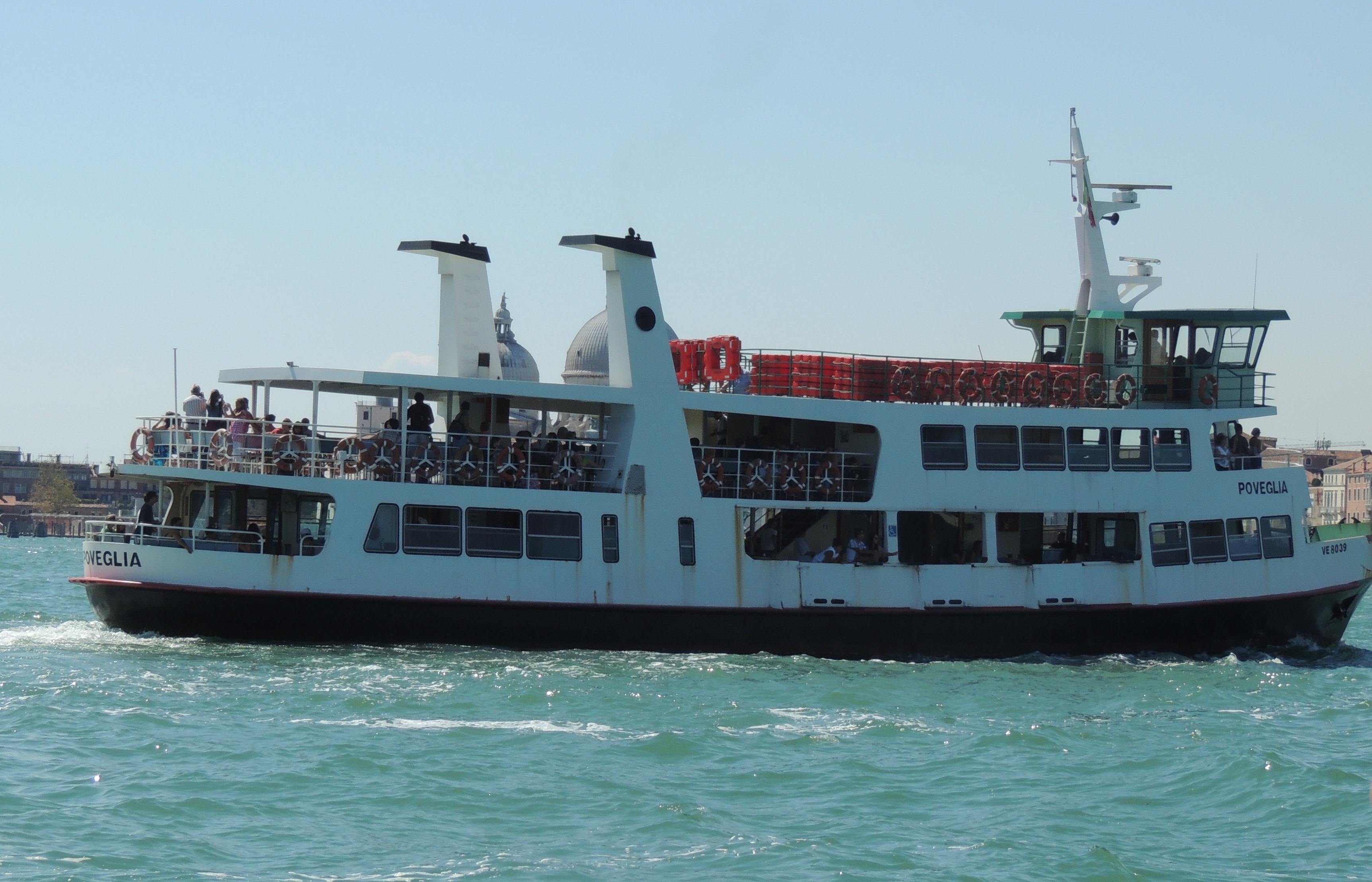 poveglia